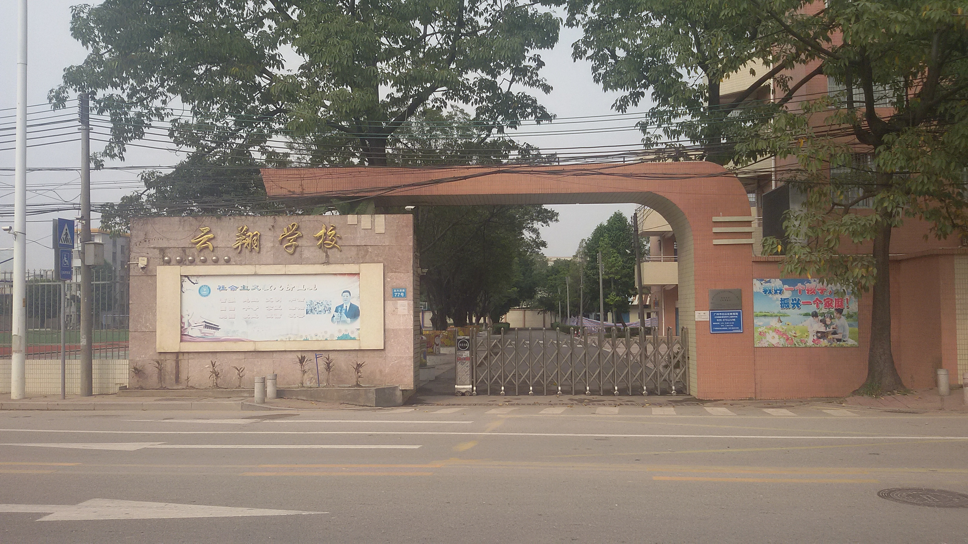 粵語: 白雲區雲翔學校